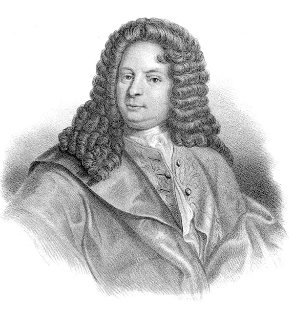 Olof Nilsson Skragge, raised to nobility with the name Hermelin, born 1658, disappeared at the battle of Poltava in 1709. Swedish professor in rhetoric and law, rikshistoriograf, statssekreterare, diplomat.